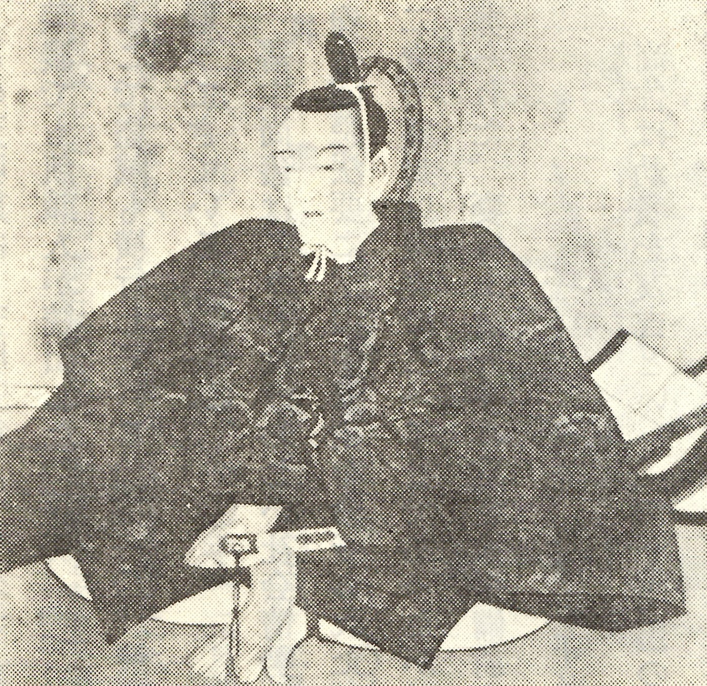 永井直旧の肖像。